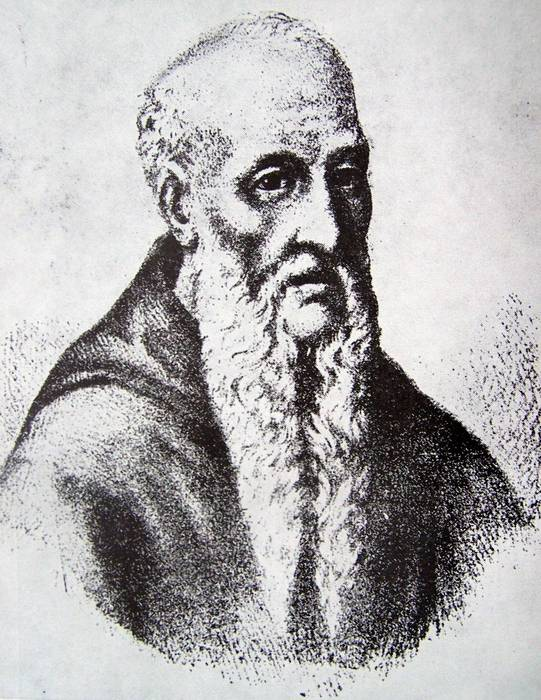 Odorik de Pordenone (zvaný Oldřich Čech)